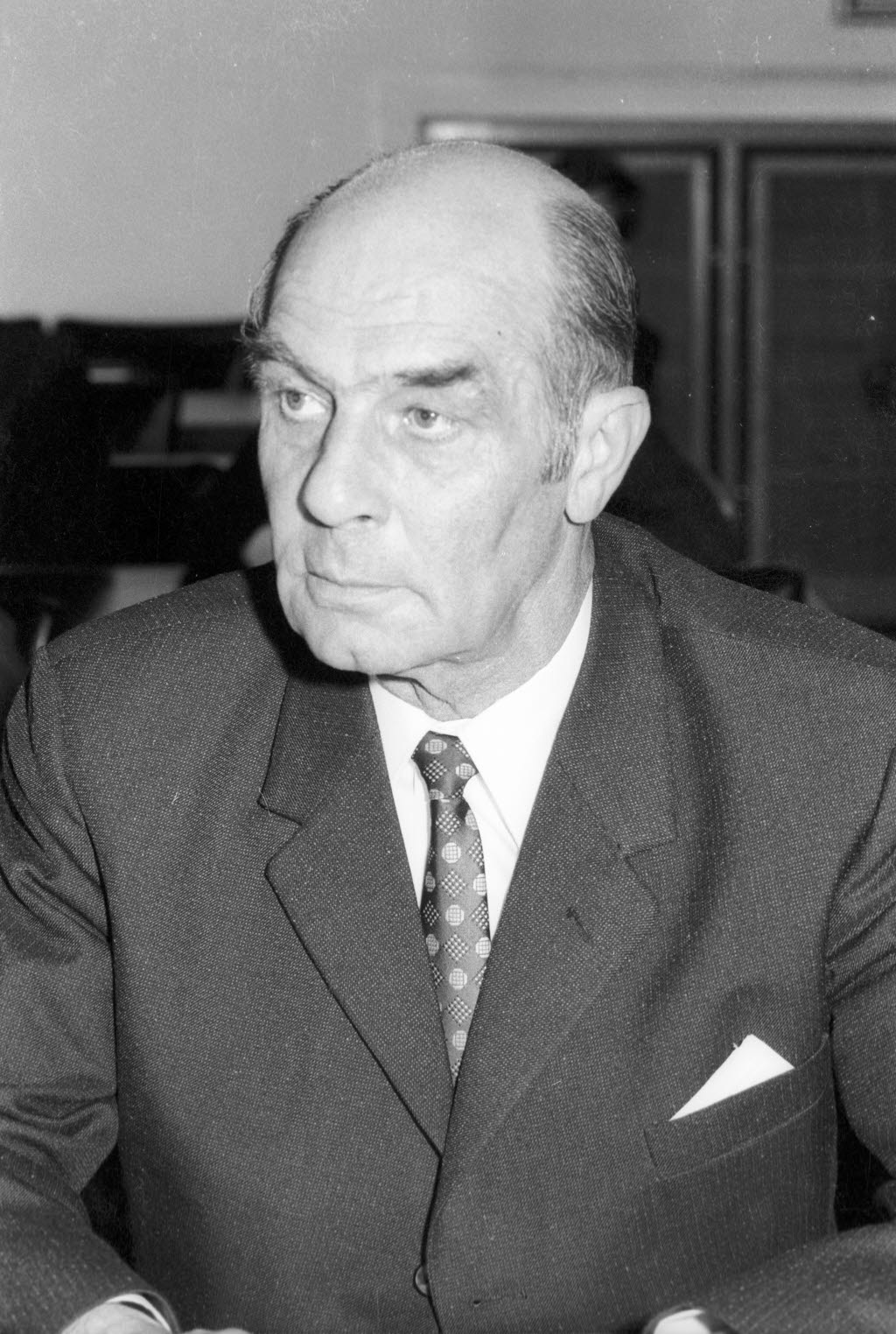 Ehrenamtlicher Stadtrat (CDU).